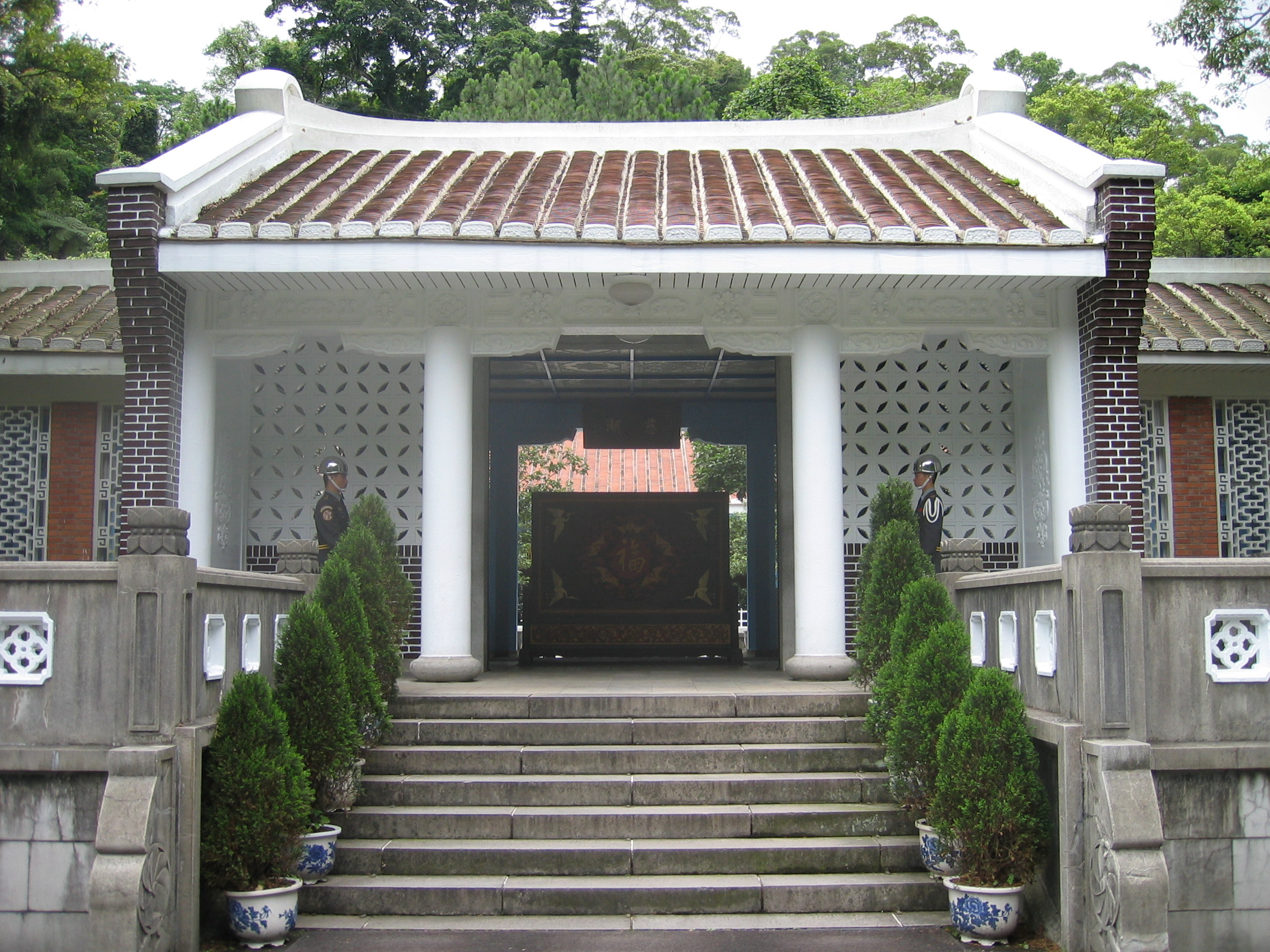 中華民國臺灣省桃園縣大溪鎮的先總統 蔣公陵寢。